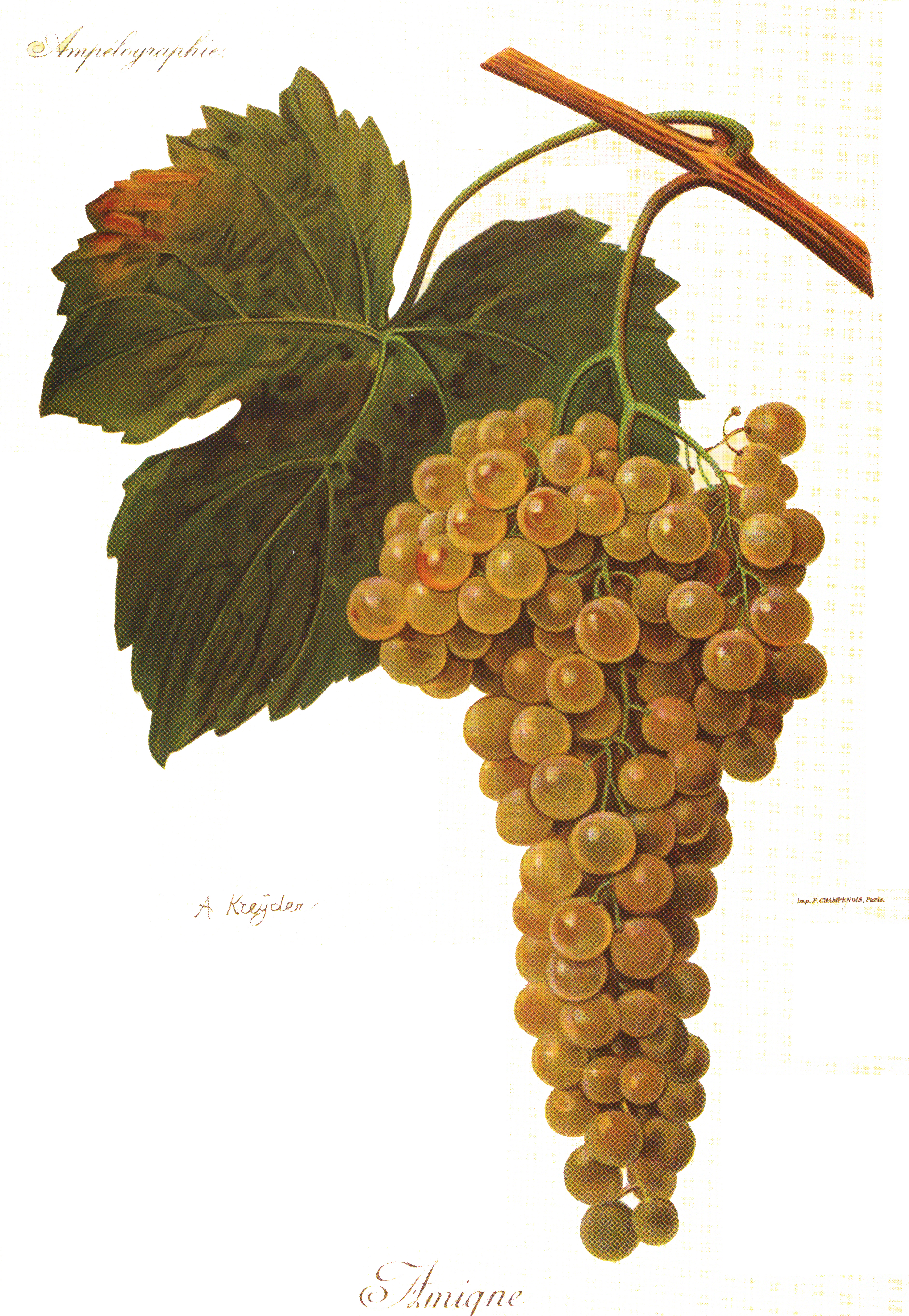 Amigne w L'Ampélographie Viali i Vermorela (1901-1910)